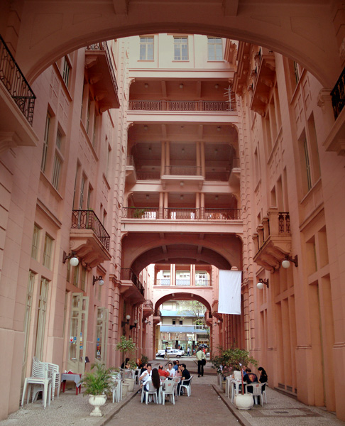 Alameda dos Cataventos, uma ruela que interliga, atravessando a Casa de Cultura, a avenida dos Andradas e a rua Siqueira Campos